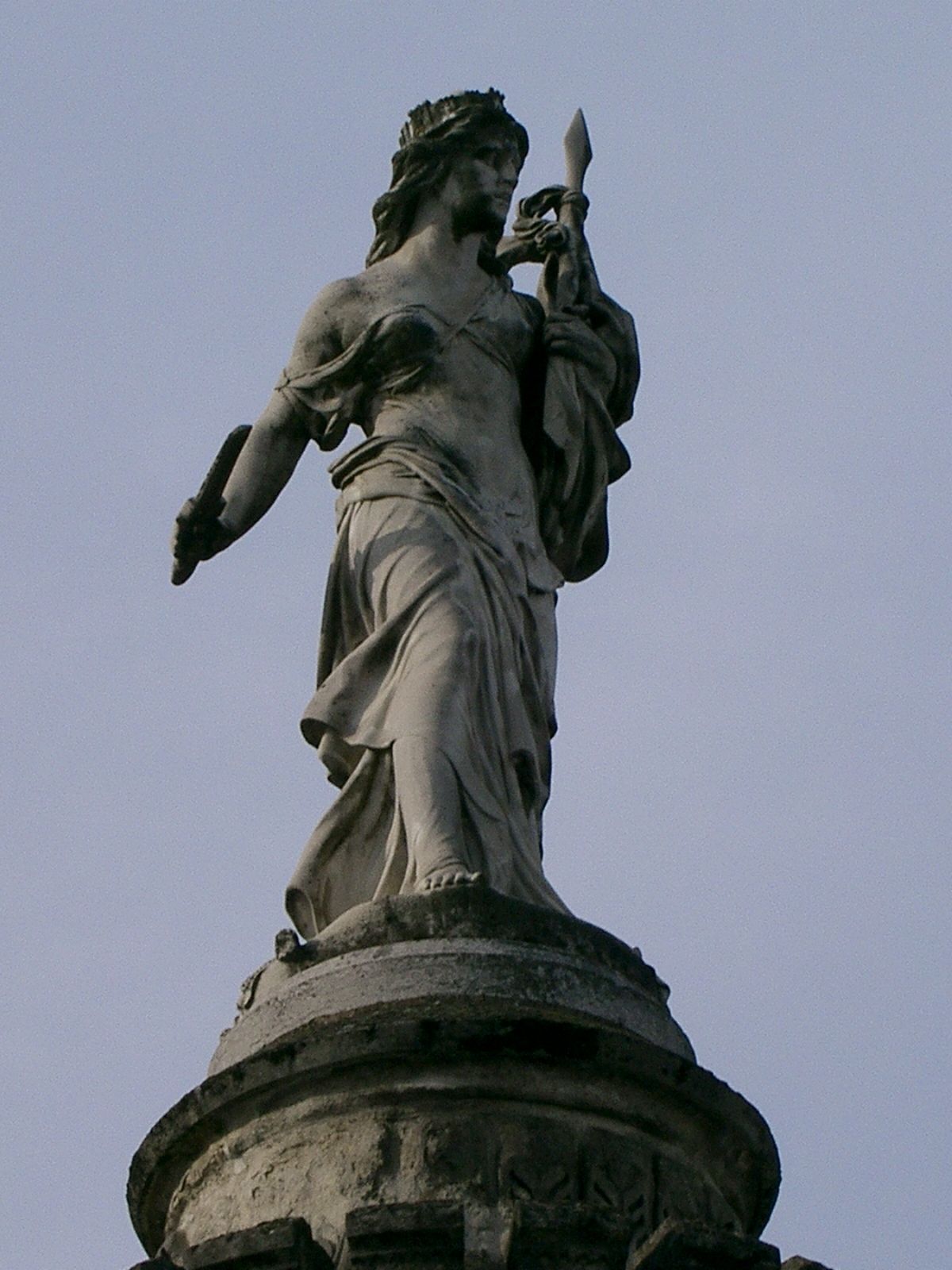 Statue de Paul Cabet pour le monument à la gloire des défenseurs de la ville de Dijon en 1870 (en collaboration avec François Jouffroy). Située Place du 30 octobre à Dijon (France). self made (PRA)